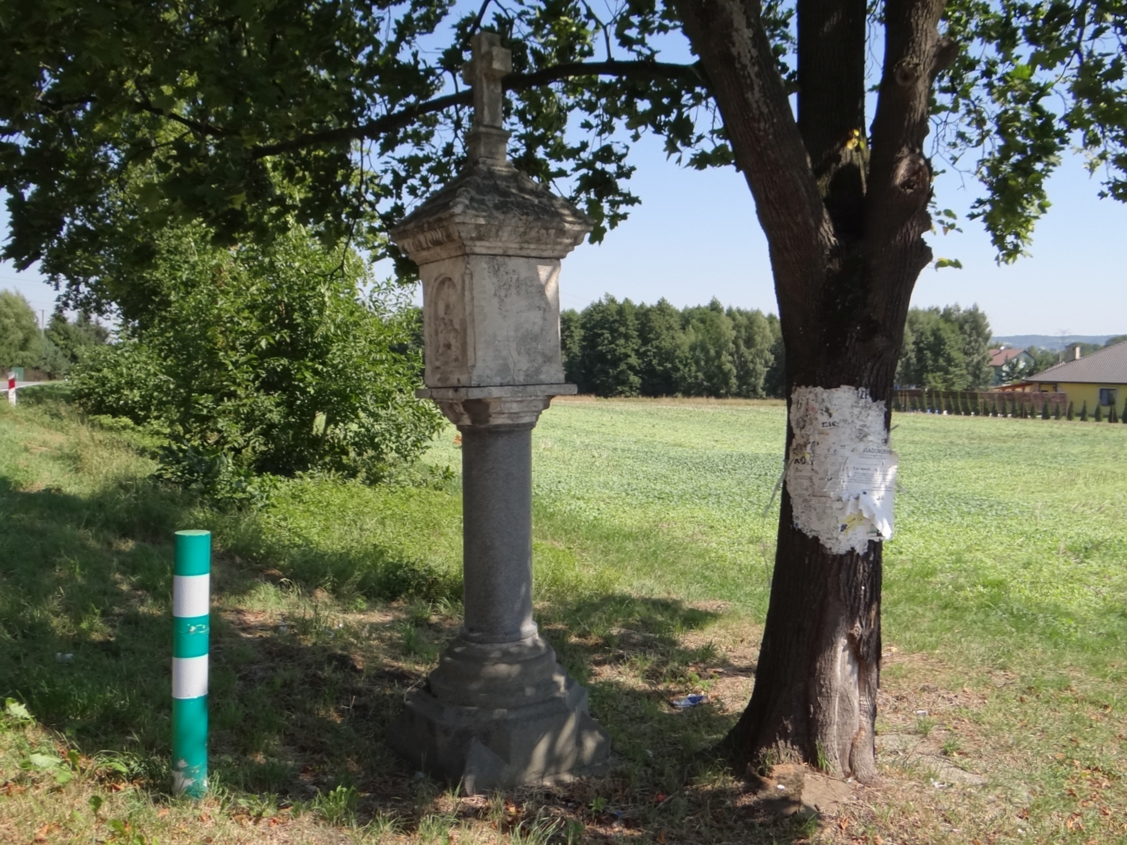 Wielka Wieś